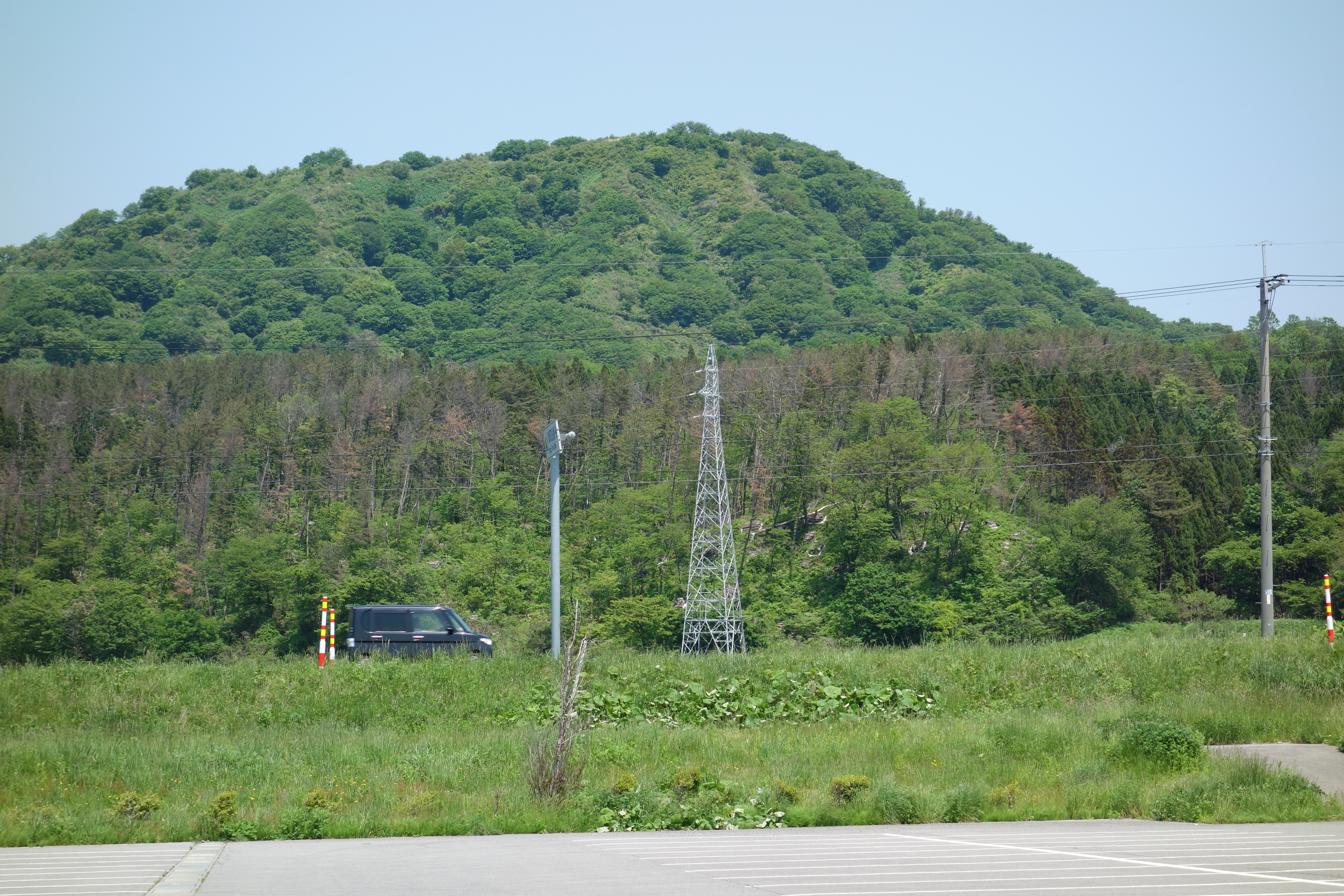 八峰町役場から望む母谷山